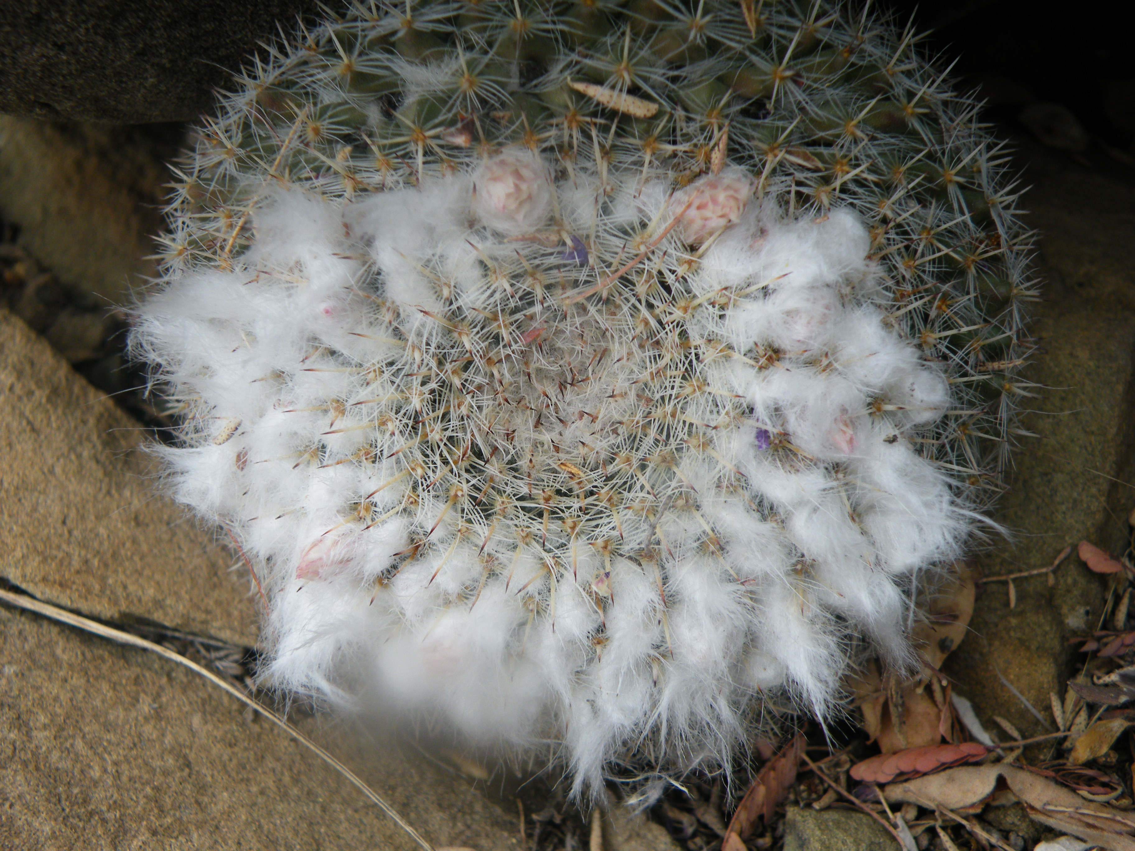 From Saltillo to Estacion Marte, Nuevo Leon